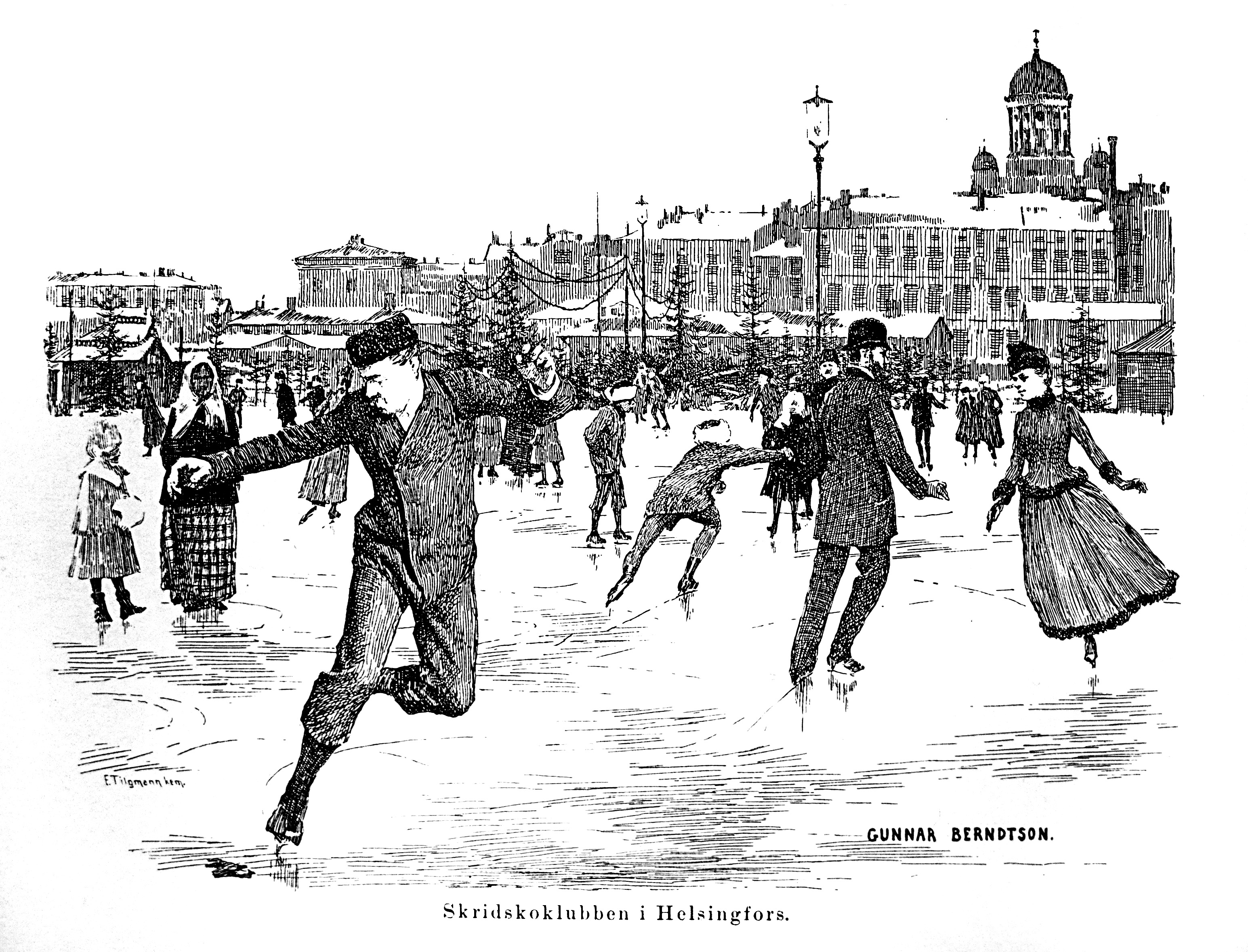 Gunnar Berndtsonin piirros Skridskoklubben i Helsingfors / Helsingin Luistinseura